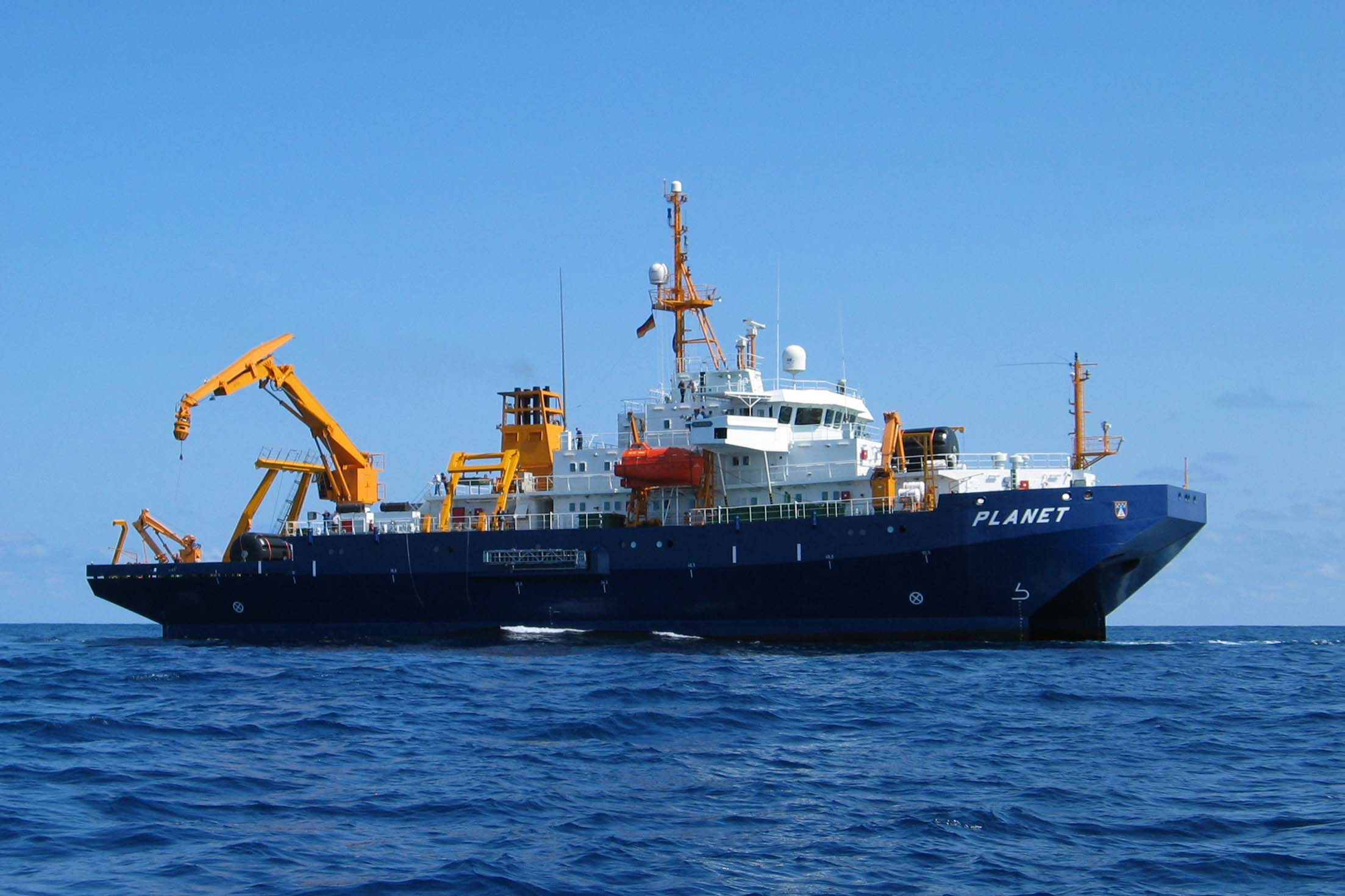 Planet bei erster Erprobungsfahrt